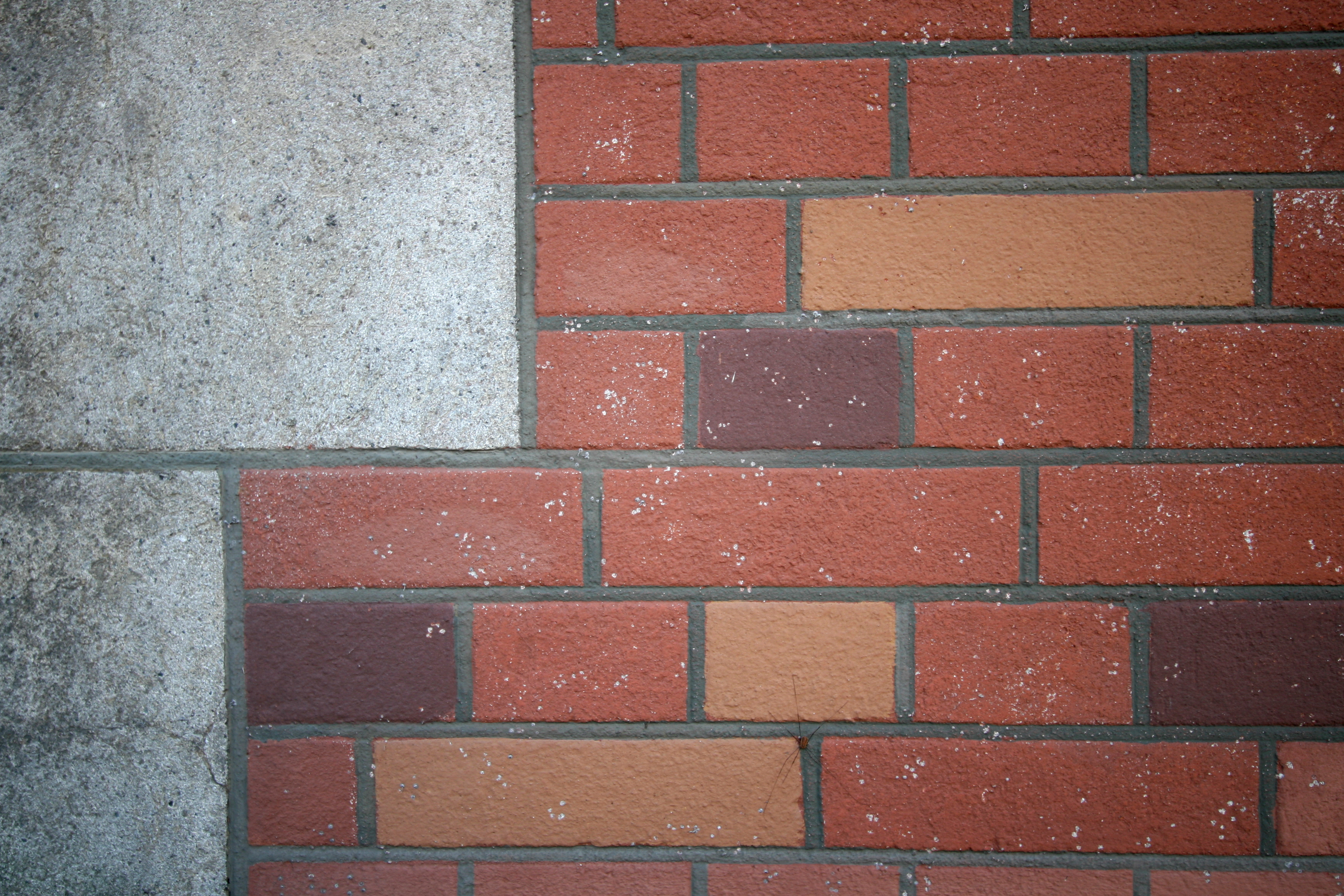 Holmens Kirke, Copenhagen, Denmark . Murdetalje.